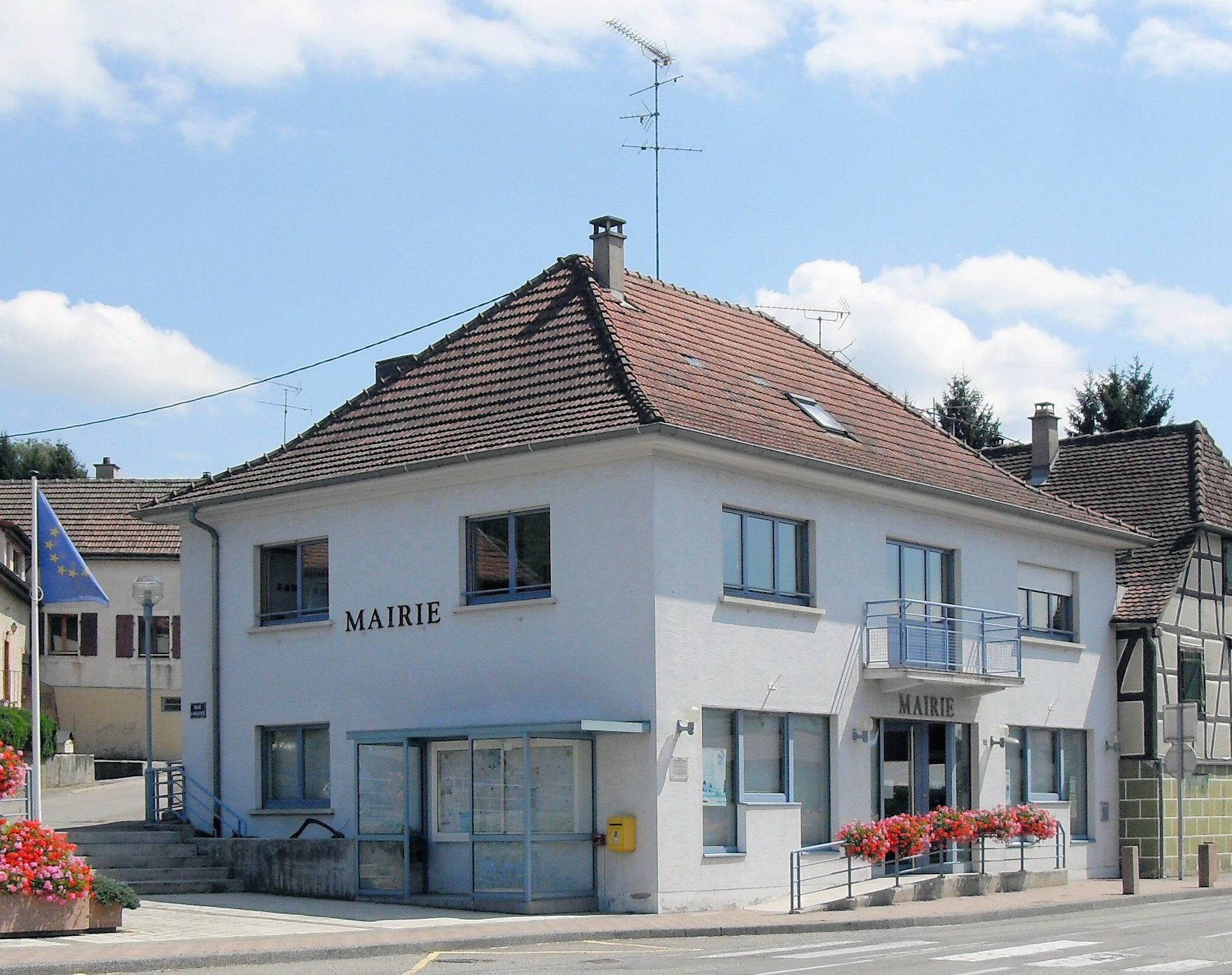 La mairie de Roppentzwiller